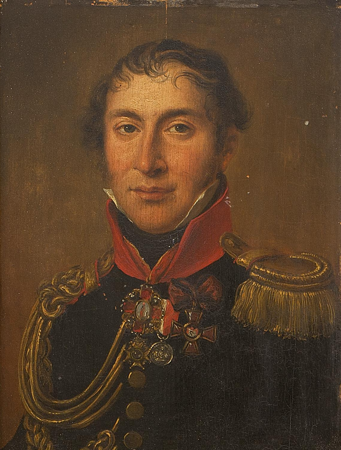 Портрет офицера Рижского драгунского полка, 1815 г. Дерево, масло; 25,0х18,0 см. Предположительно - это портрет адъютанта генерала от кавалерии принца Александра Фридриха Вюртембергского, шефа Рижского драгунского полка.